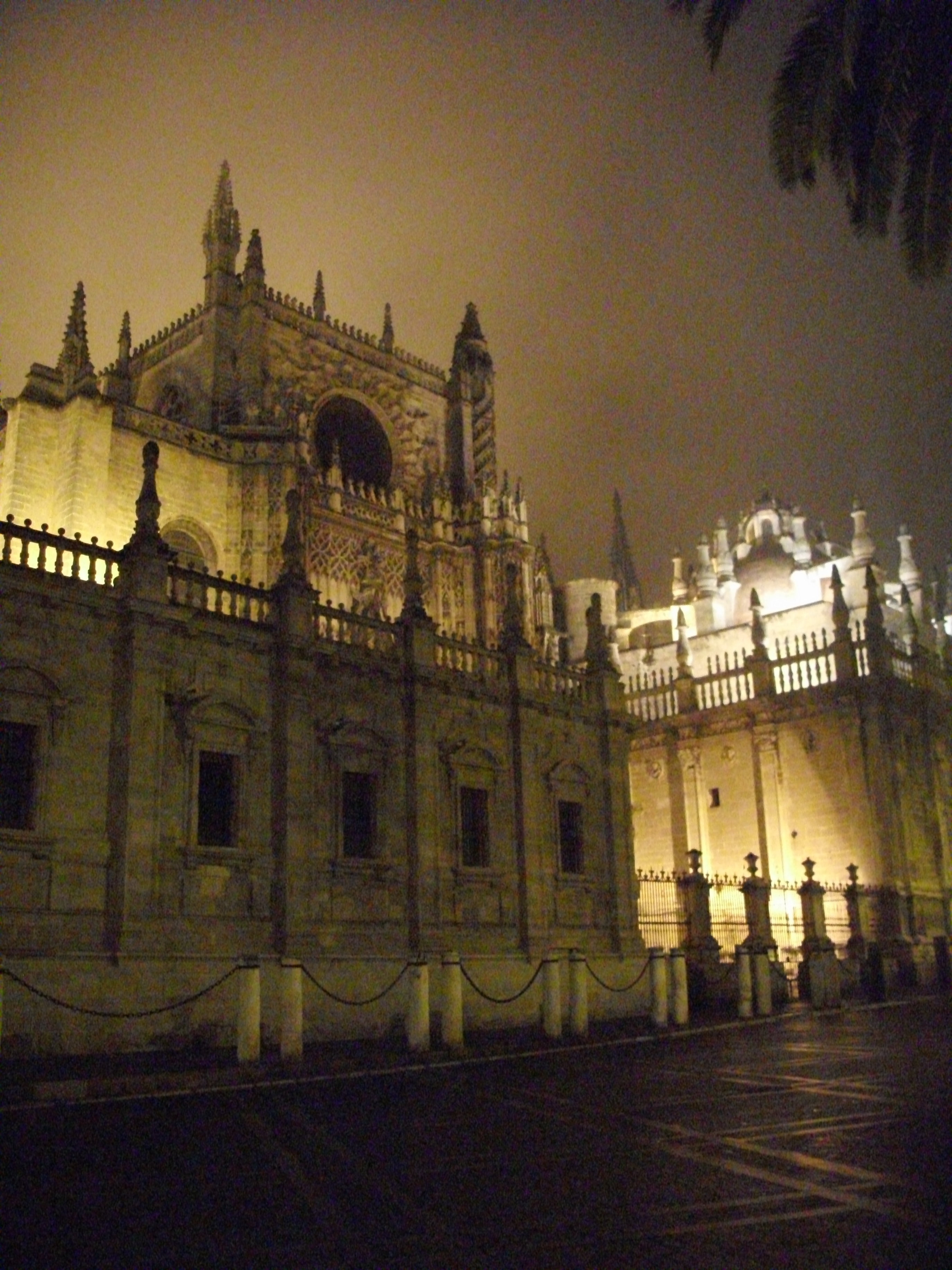 Aspecto de la catedral de Sevilla entre niebla. Noviembre de 2011